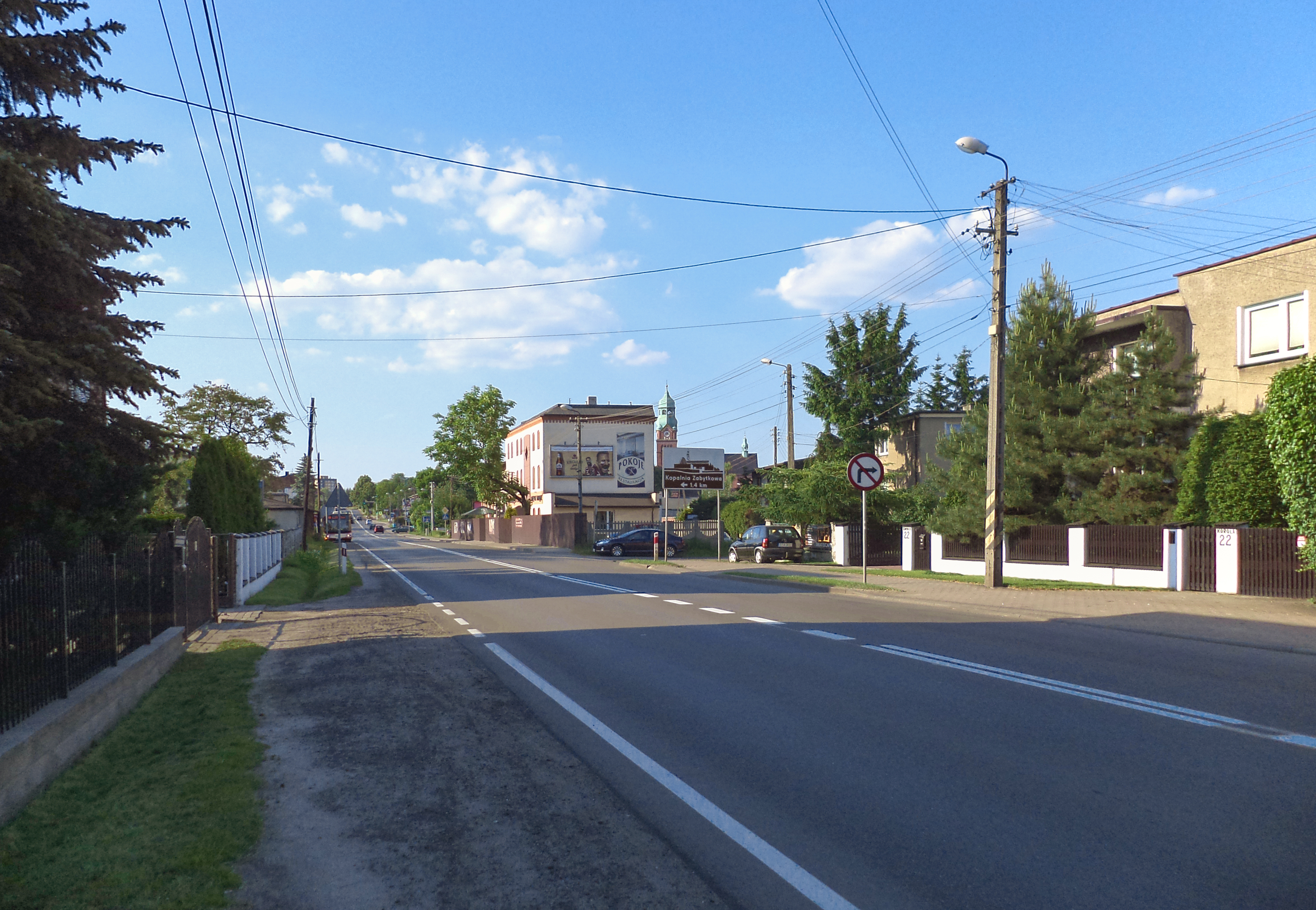 Ulica Józefa Korola w ciągu drogi krajowej nr 11 w Tarnowskich Górach